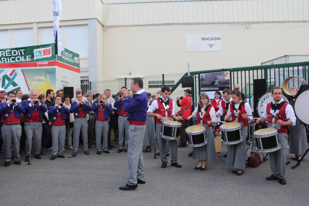 Inauguration de l'Espace François Quéré; la kevrenn Brest Sant-Mark